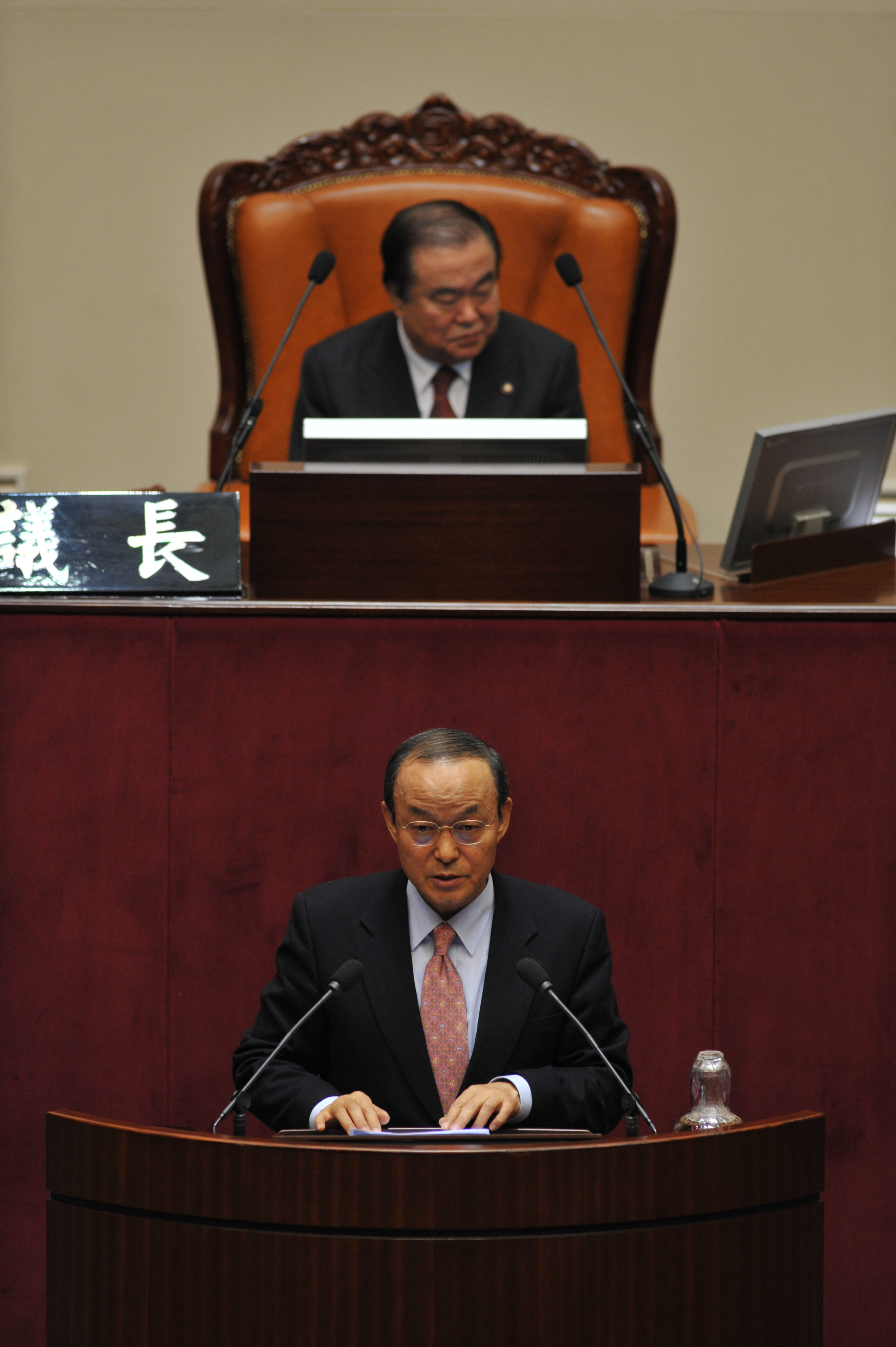 송민순 국회의원